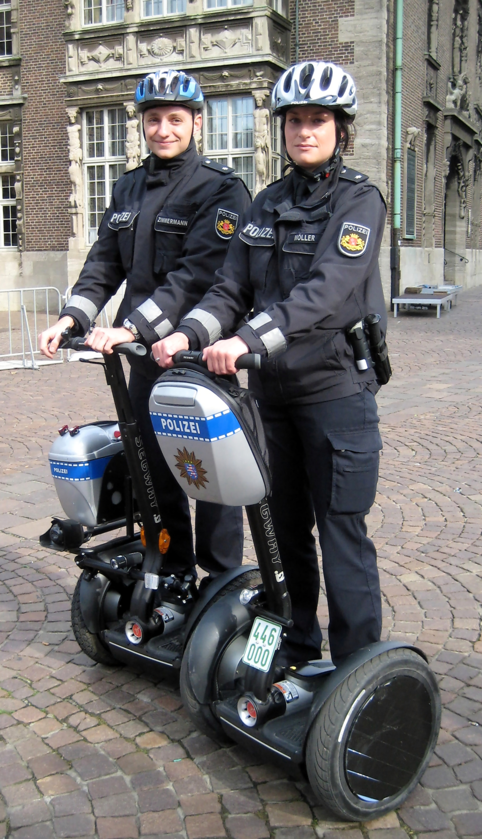 Segway PT im Einsatz als Patrouillenfahrzeug der Polizei Bremen bei einer Großveranstaltung. Fotoaufnahme beim Bürgerfest im Rahmen der offiziellen Feiern zum 20. Tag der Deutschen Einheit vom 1.–3. Oktober 2010 in Bremen, hier auf dem Grasmarkt vor dem Neuen Rathaus.